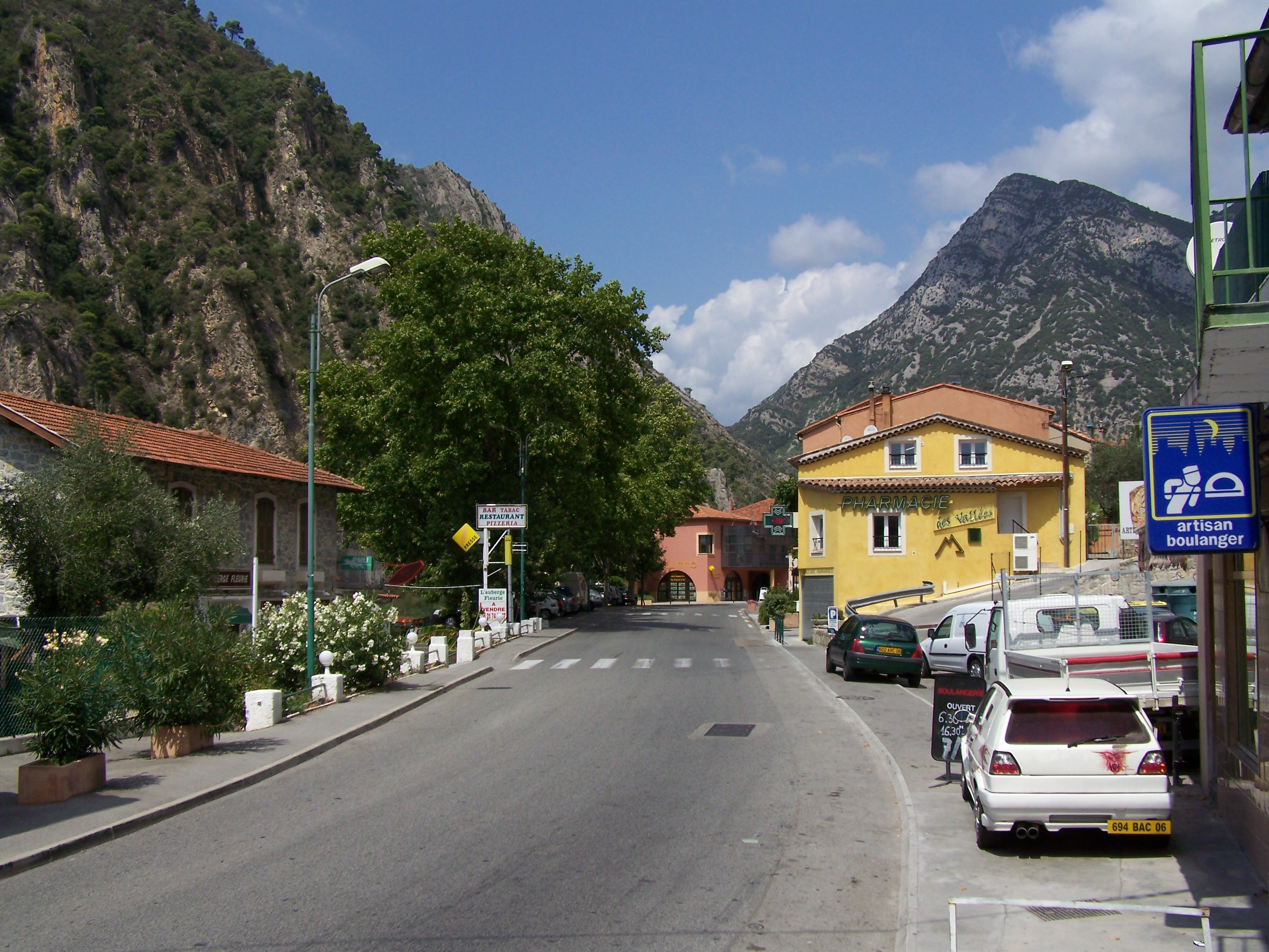 Grande rue de Plan-du-Var, hameau de la commune de Levens (Alpes-Maritimes, France).